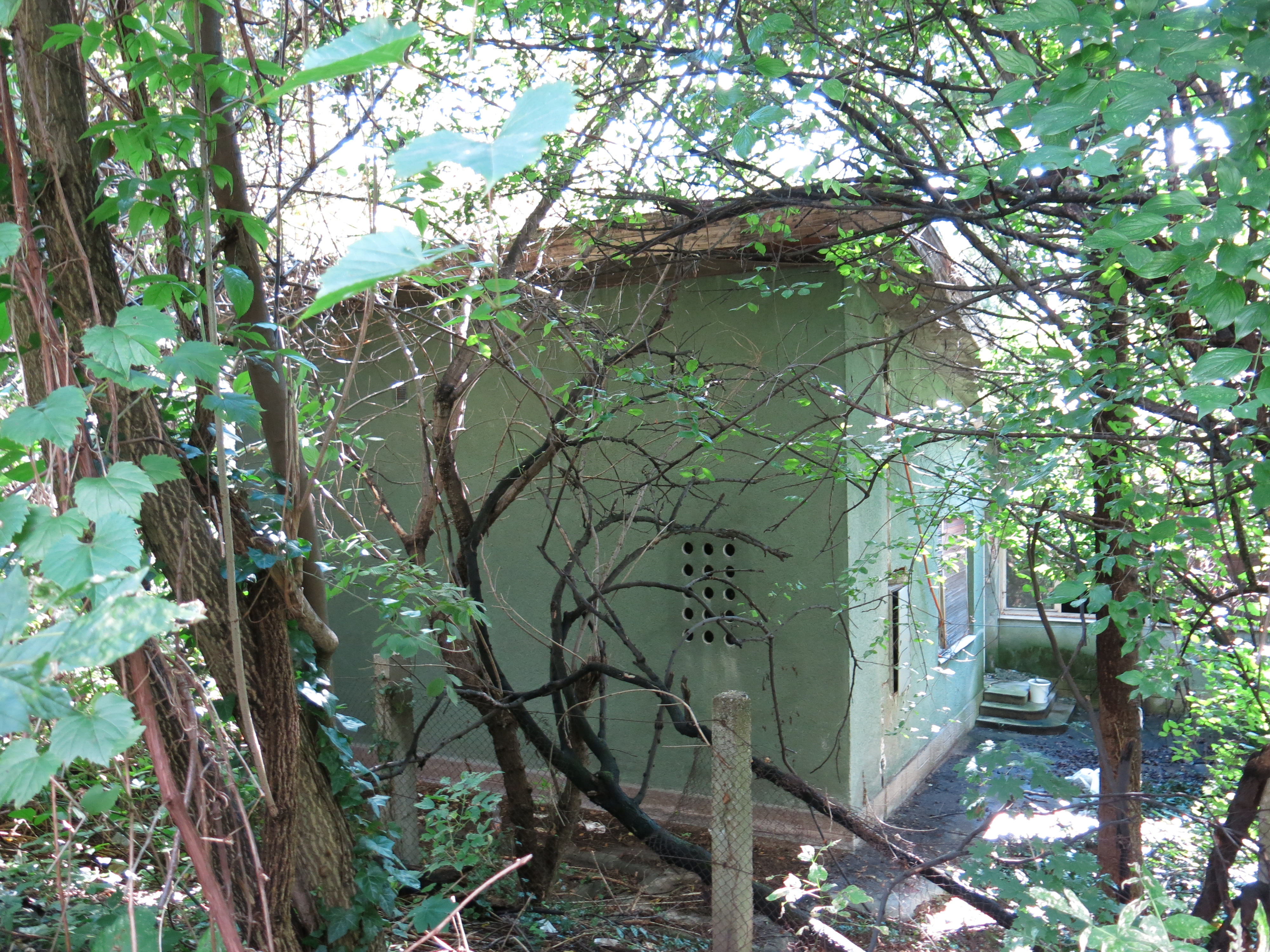 Кућа др Александра Белића